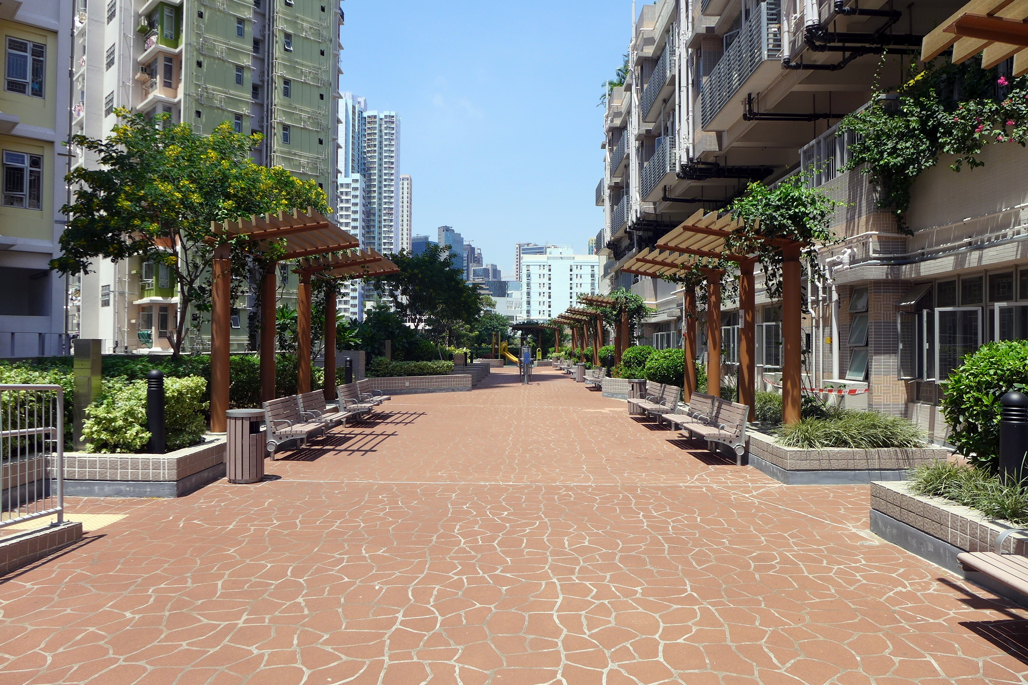 Cheung Sha Wan Station Podium Garden